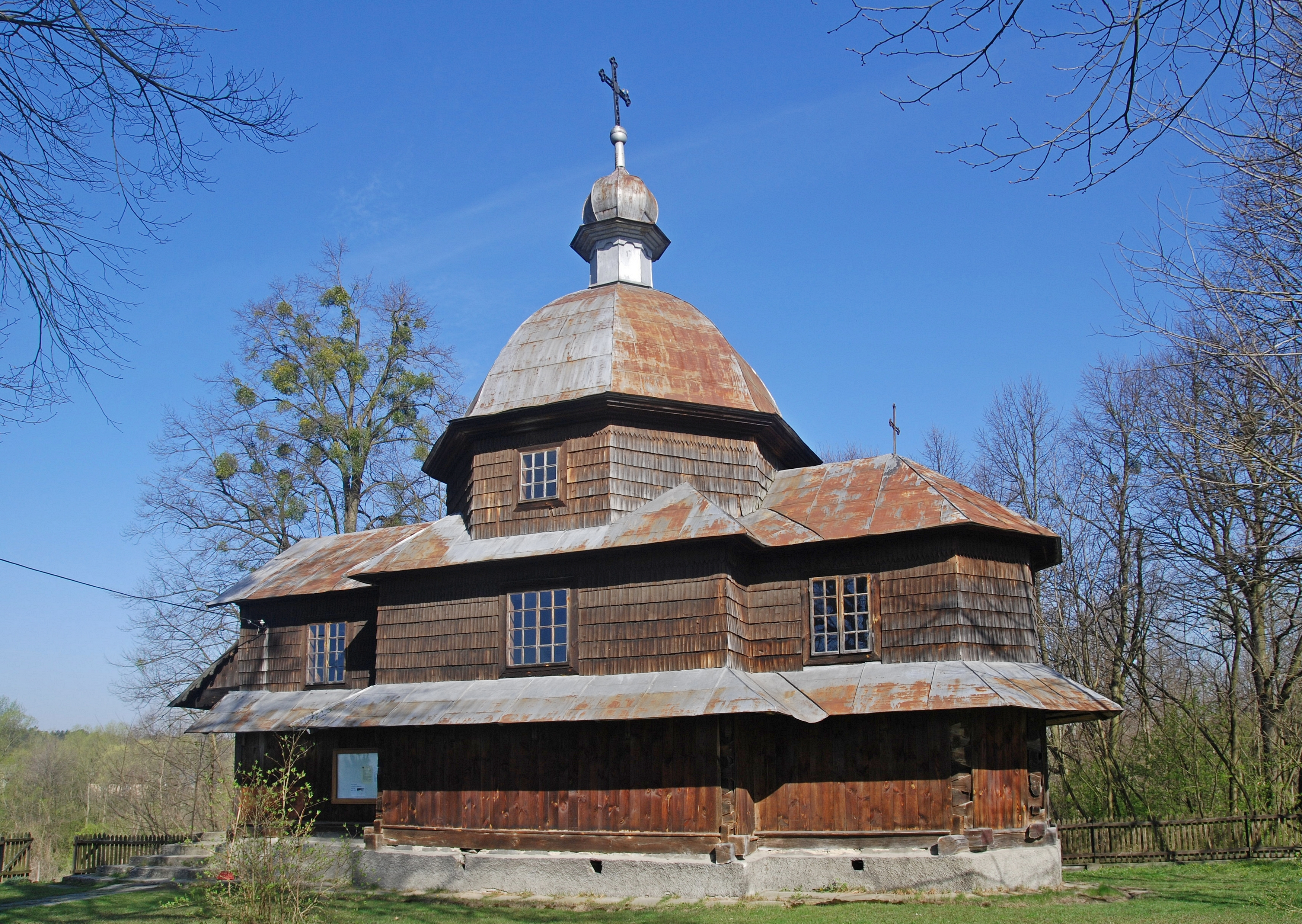 wieś Radruż, Cerkiew greko-kat. św. Mikołaja, ob. kaplica rzym.-kat. Matki Boskiej Śn… Wikidata has entry Q30535963 with data related to this item.